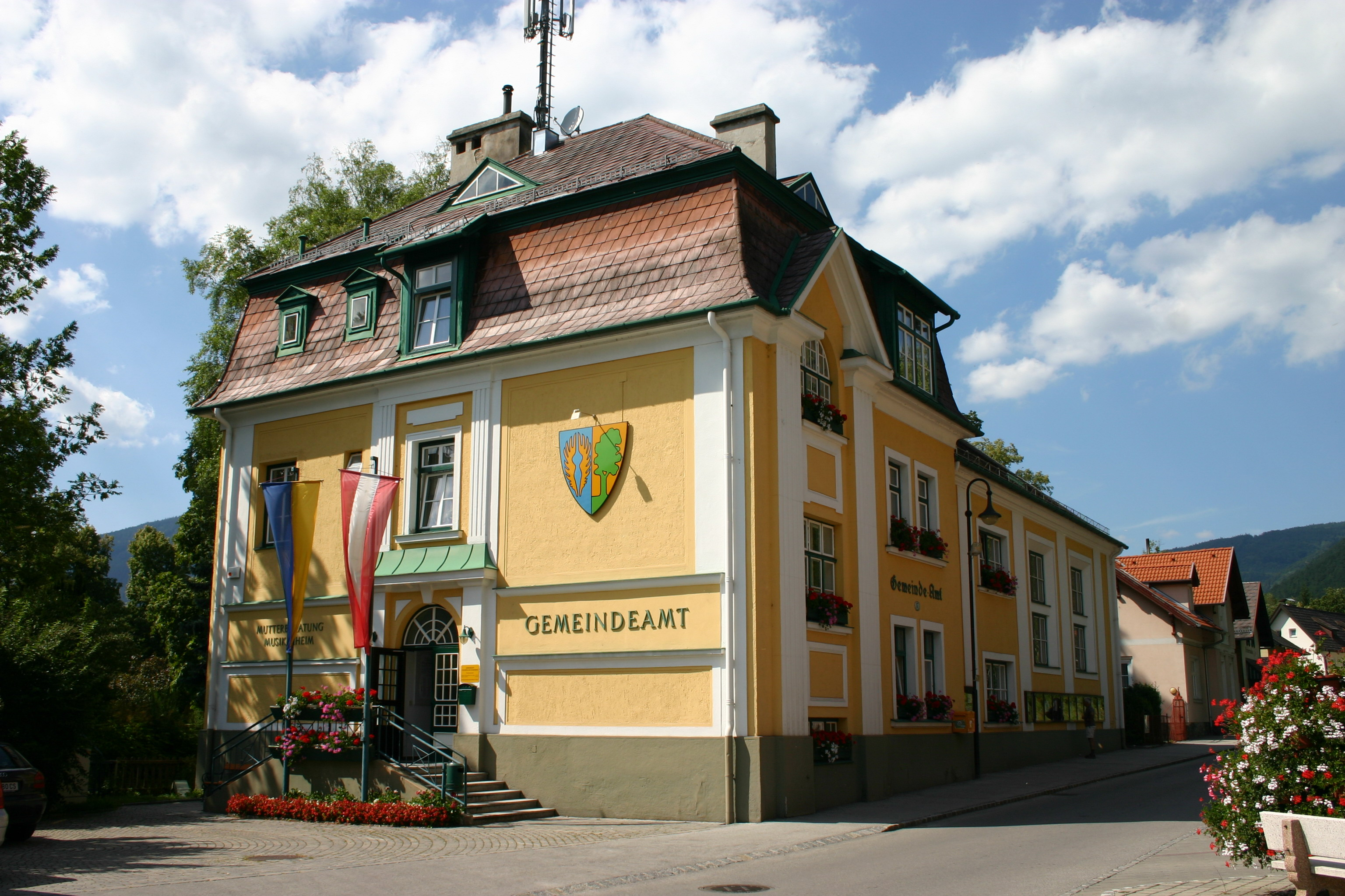 Puchberg am Schneeberg Gemeindeamt